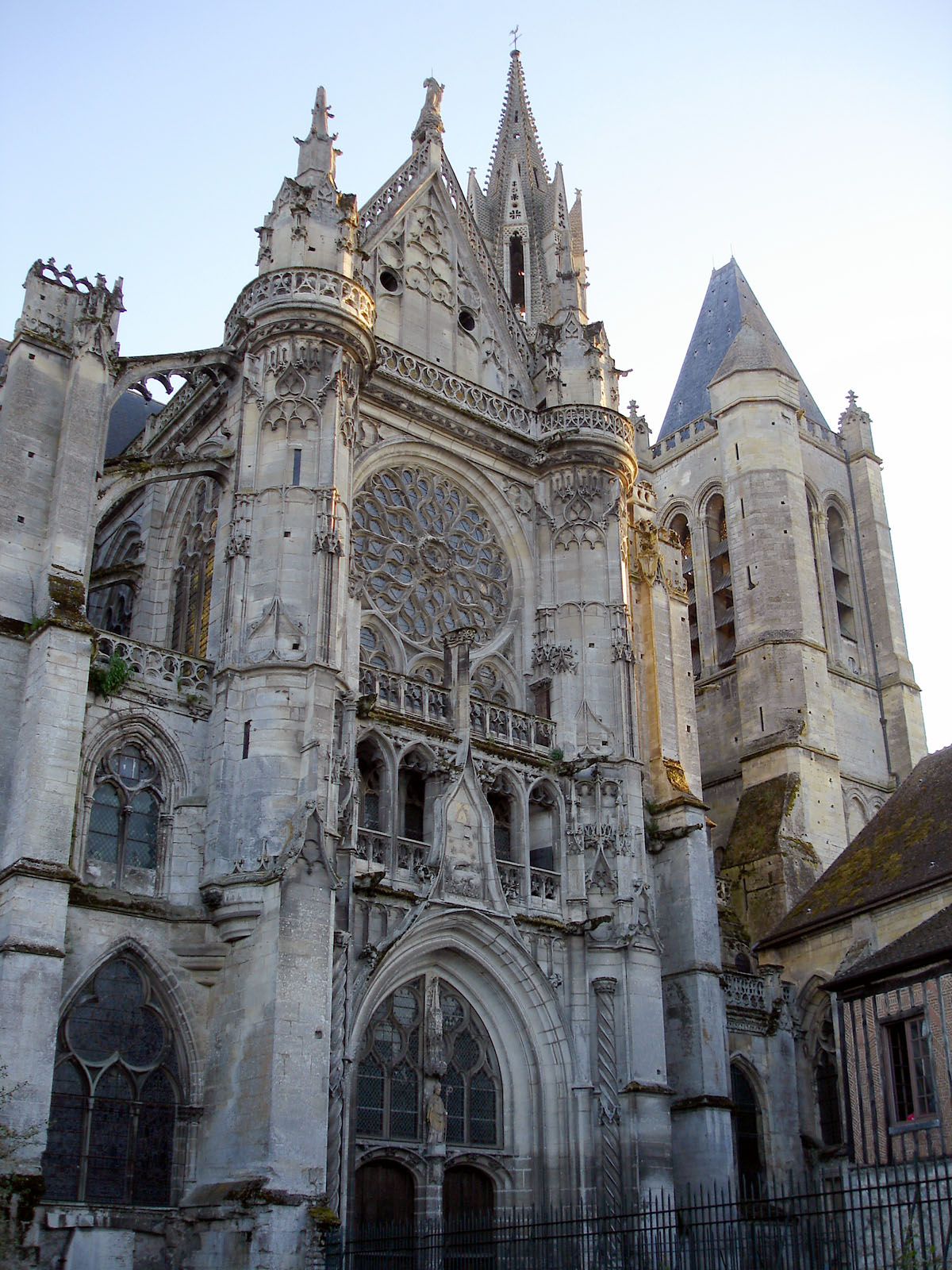 Façade nord du transept de la cathédrale Notre-Dame de Senlis, Oise, France.